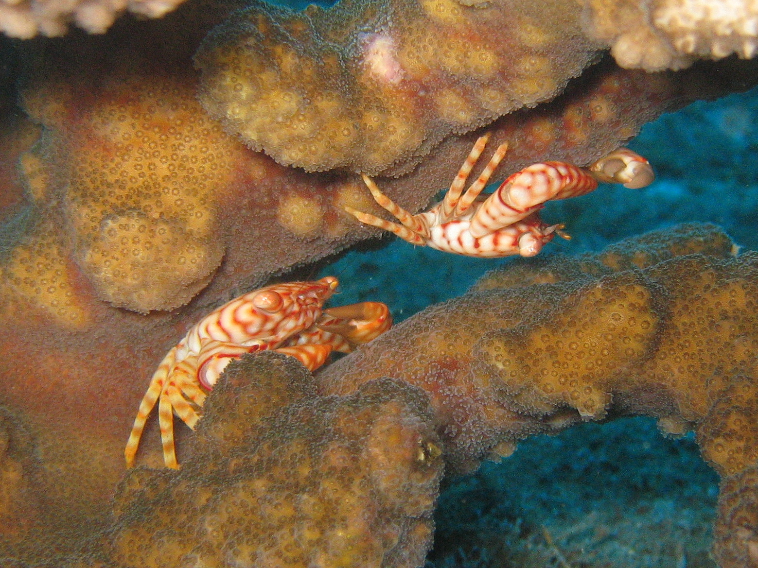 Trapezia flavopunctata & Pocillopora sp. sur le site de la barge de St. Paul à la Réunion.